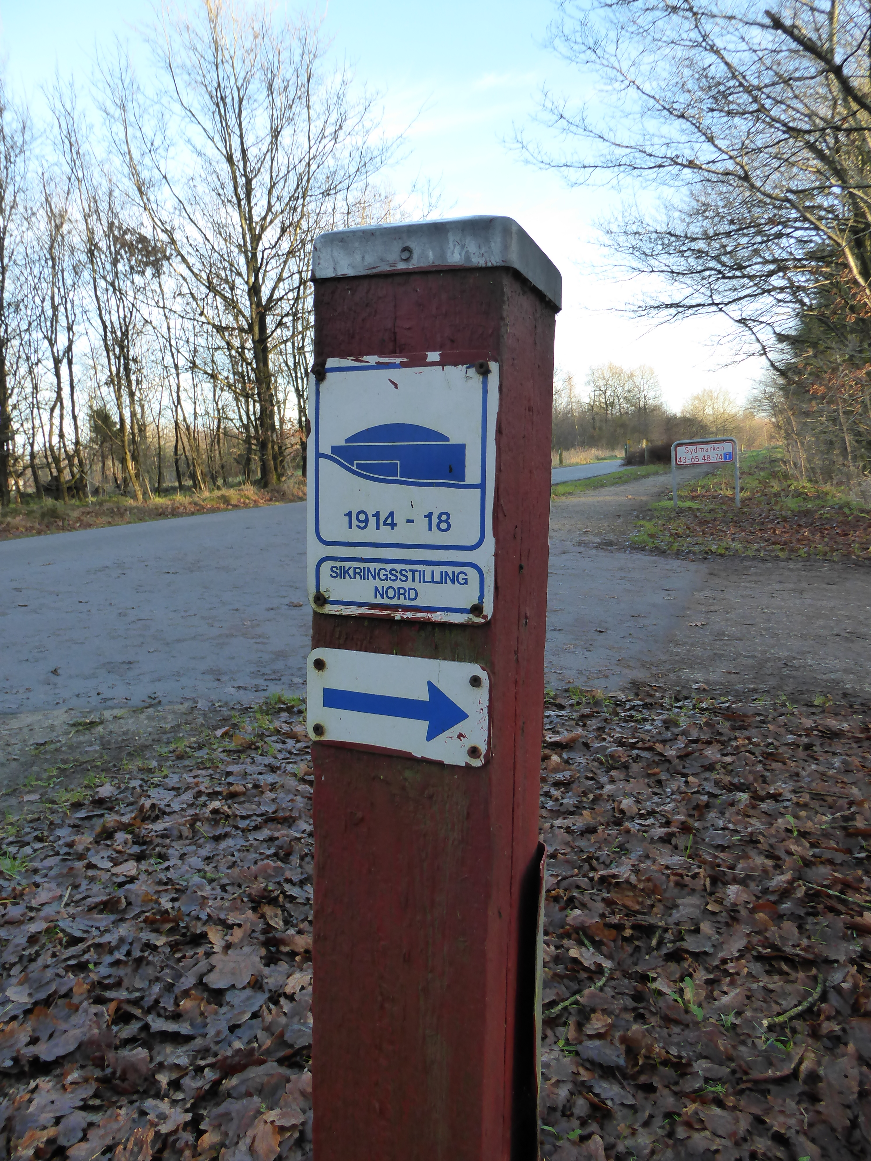 En vejviser til en rest af Sikringsstilling Nord